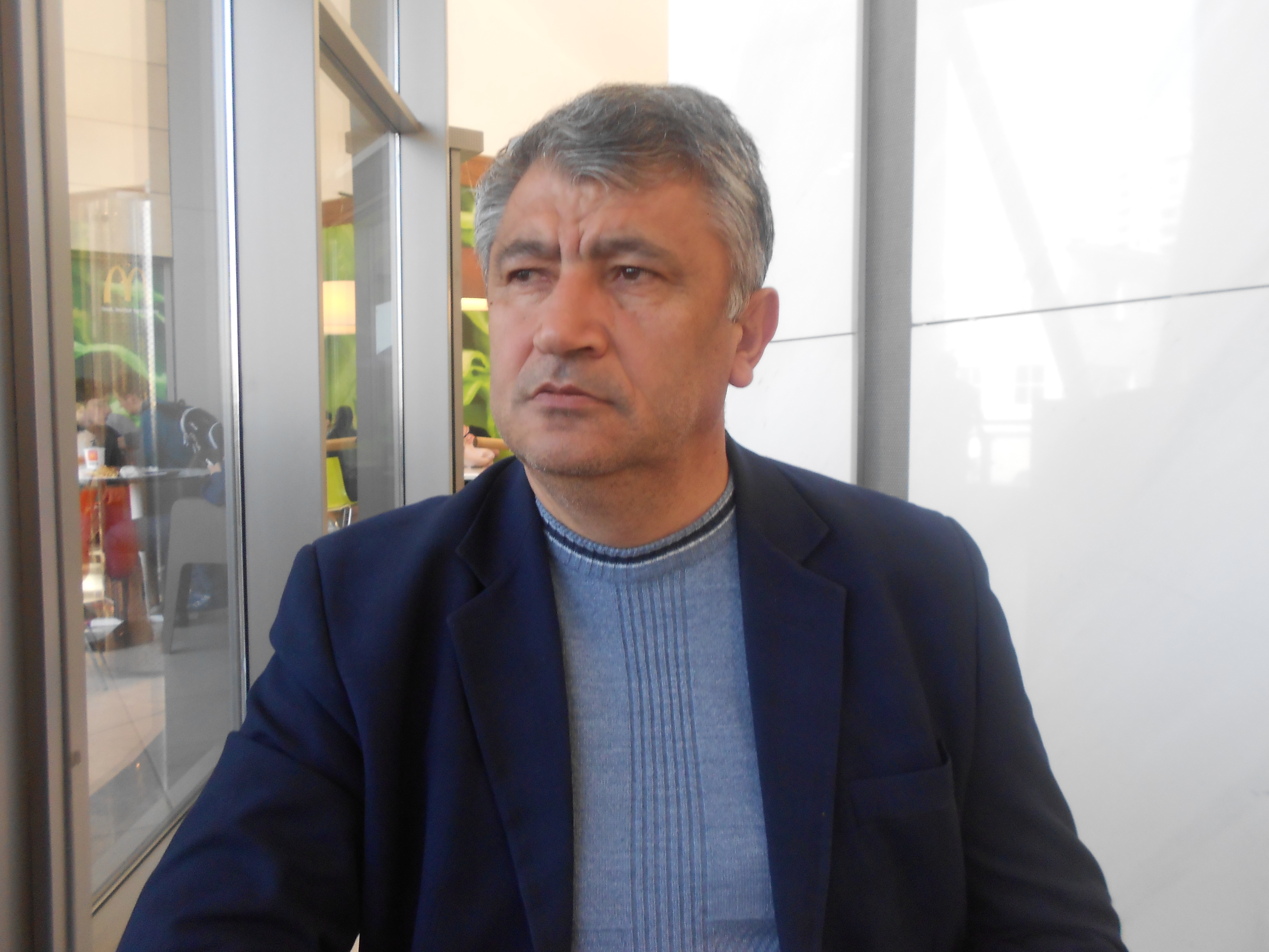 Qəşəm Nəcəfzadə (Nəcəfov Qəşəm Mirzə oğlu; d. 1 aprel 1959, Əliqulular, İmişli rayonu, Azərbaycan SSR, SSRİ) — Azərbaycan şairi və publisisti. Azərbaycan Yazıçılar Birliyinin üzvü (1986)